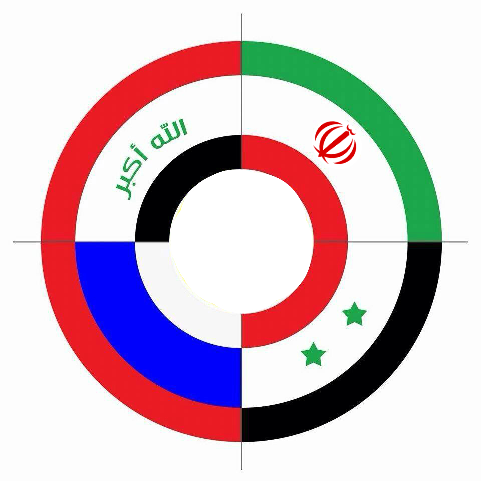 التحالف الرباعي بين روسيا وعراق وسوريا وايران (تعديل شعار)